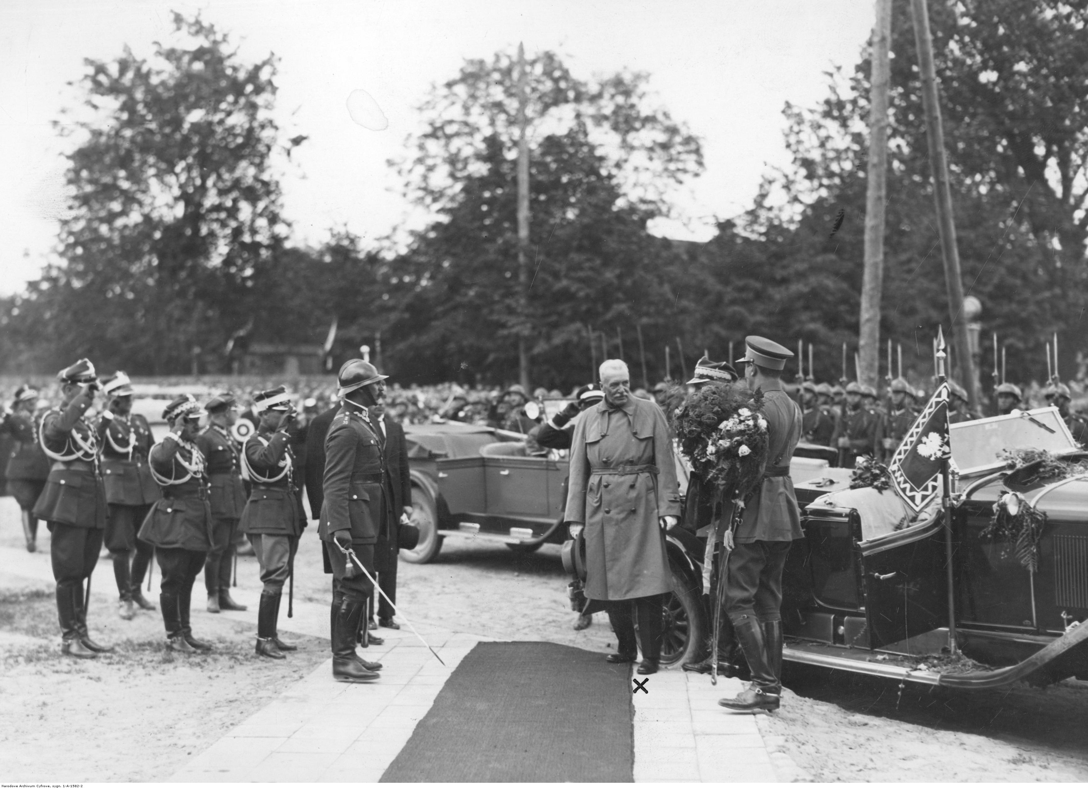 Wizyta prezydenta RP Ignacego Mościckiego na Polesiu-pobyt w Brześciu nad Bugiem - Prezydent RP Ignacy Mościcki witany przez wojsko. Koncern Ilustrowany Kurier Codzienny - Archiwum Ilustracji. Sygnatura: 1-A-1582-2